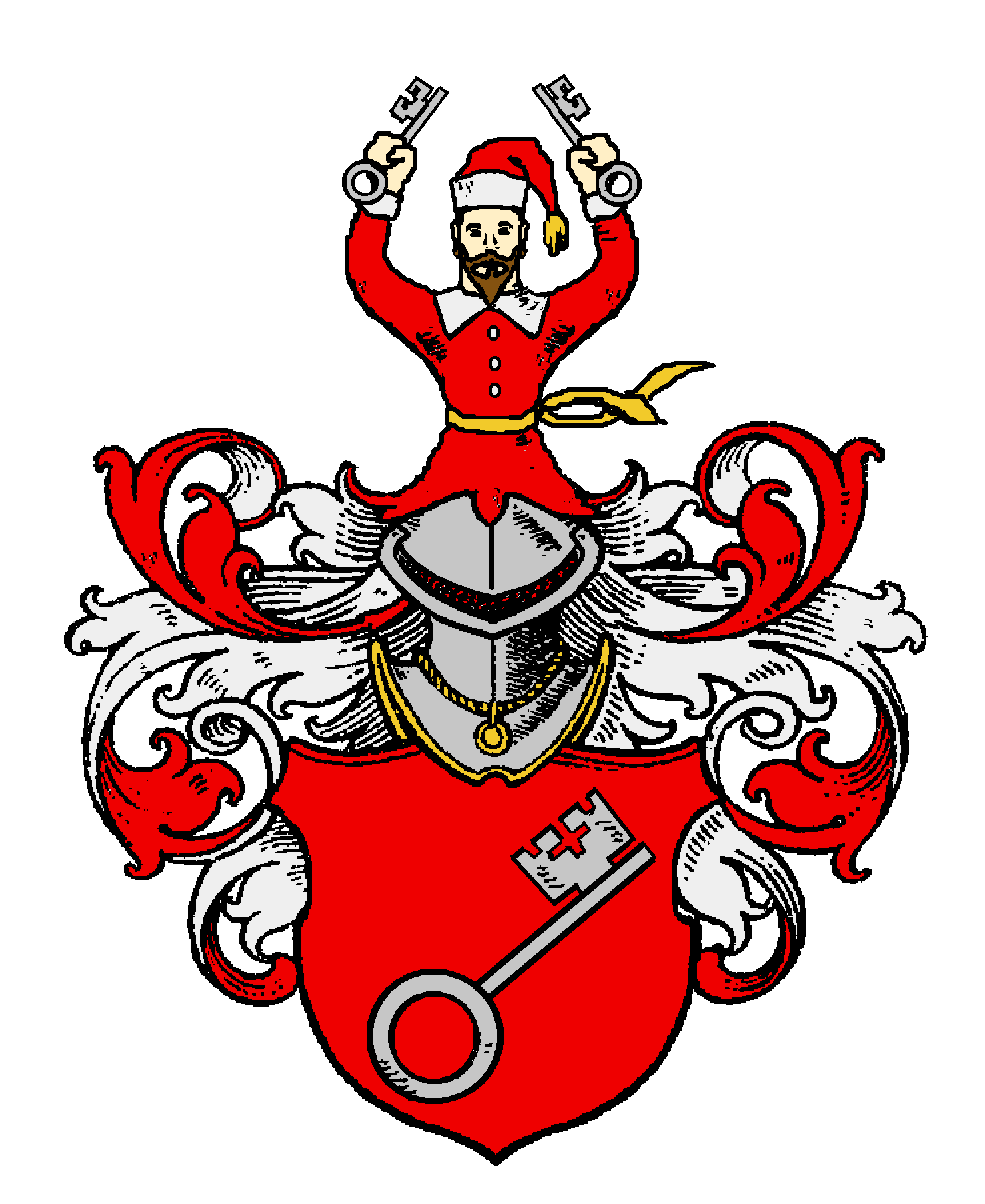 Familienwappen der Keller, Ratsgeschlecht der Reichsstadt Esslingen, nach der Maßgabe, wie es der Hofpfalzgraf Samson Hertzog am 3. Juni 1595 dem Alexander III. Keller, Rats- und Gerichtsverwandten zu Esslingen (nachmals Bürgermeister) im Kaiserlichen Wappenbrief festgelegt hat: [1]